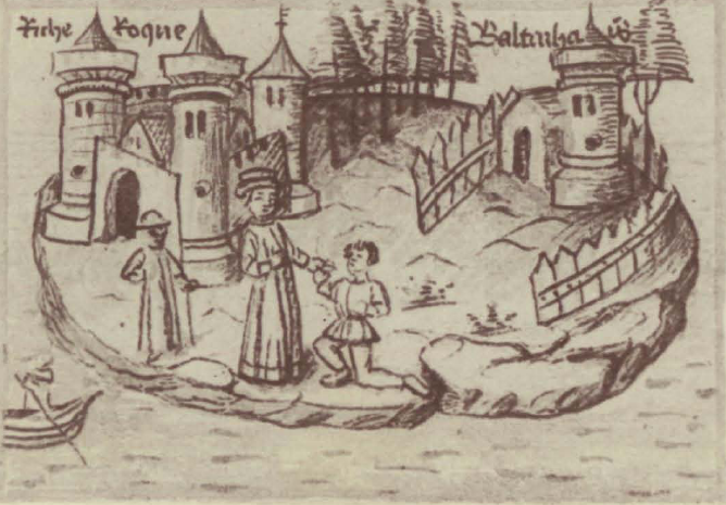 Ilustración idealizada titulada "Cómo Béthencourt y Gadifer tuvieron controversias" incluida en el capítulo LXI de la versión de "Le Canarien" conocida como "texto B", que muestra a Jean IV de Béthencourt y Gadifer de La Salle en la isla de Fuerteventura, durante su campaña de conquista de las islas Canarias, con los castillos de Riche Roque (Rico Roque) y Baltarhais (Valtarajal) al fondo.